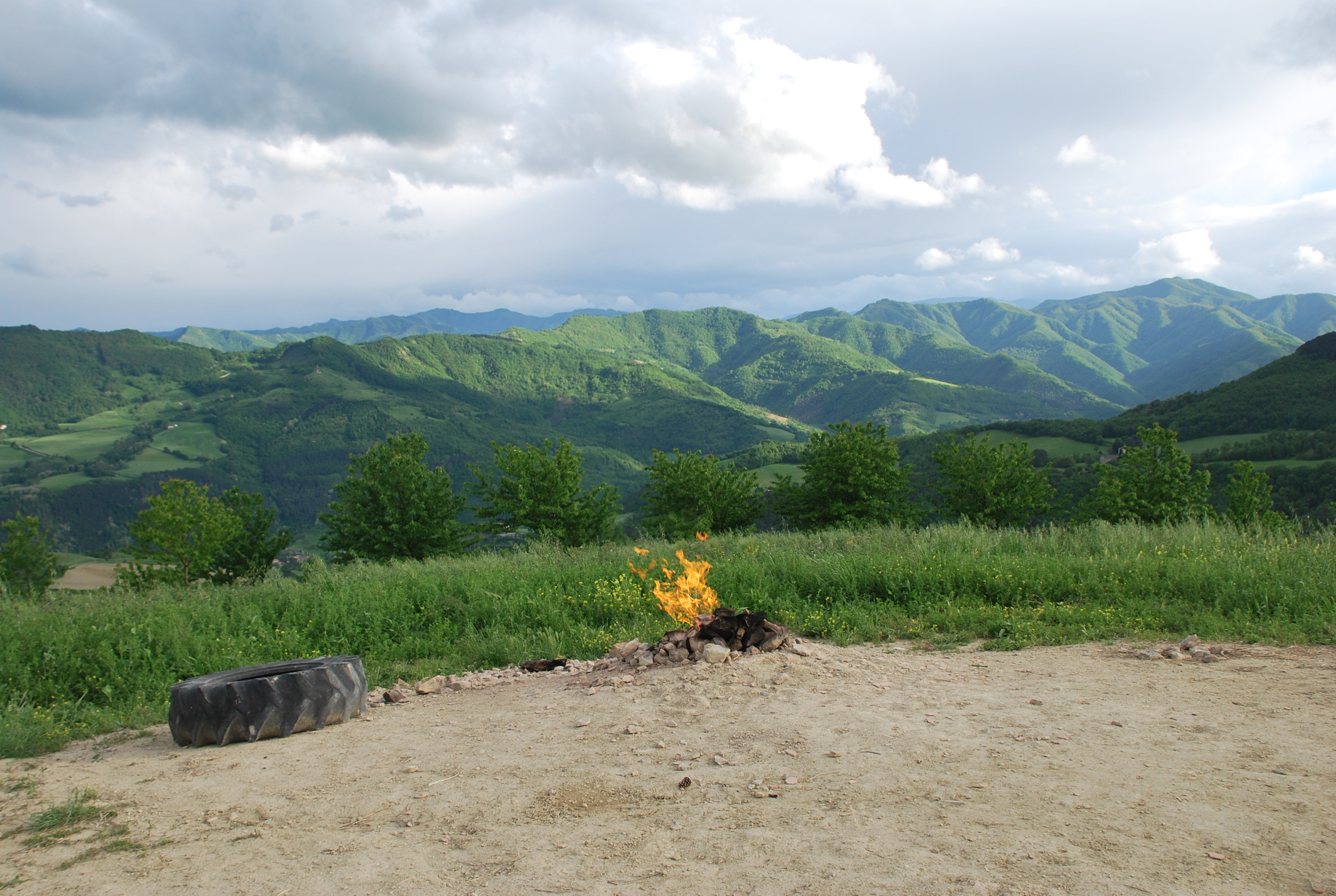 Tredozio (FC). Il piccolo vulcano. 19 Maggio 2013